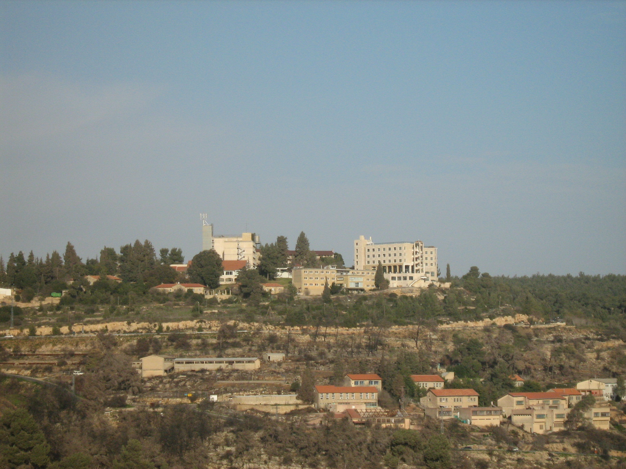 מעלה החמישה